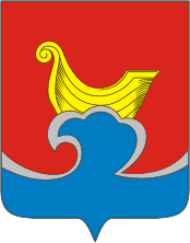 «В червлени (красном поле) на лазоревой (синей, голубой), окаймленной серебром бегущей вправо волне золотая ладья».